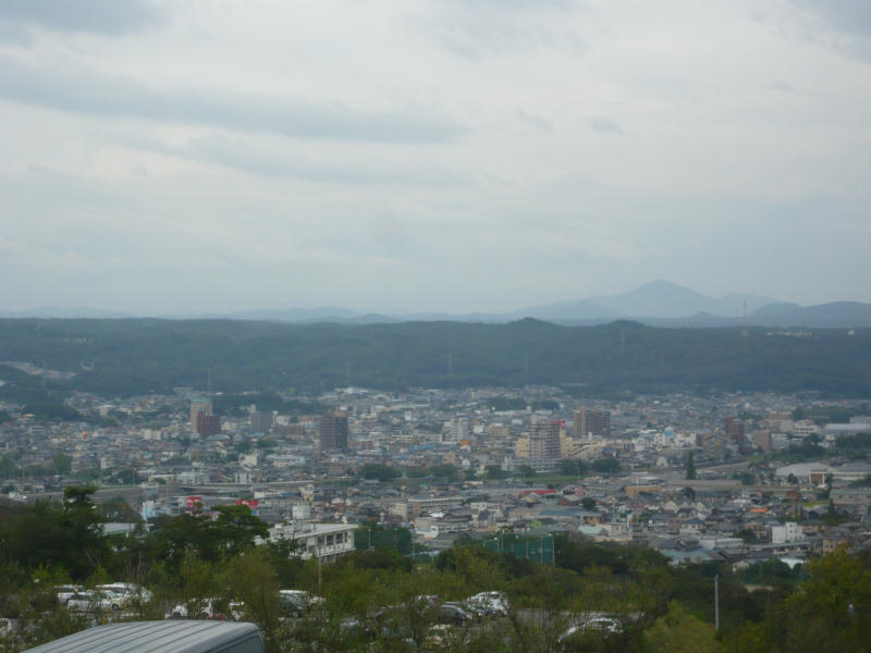 土岐市中心部。土岐プレミアムアウトレットより撮影。